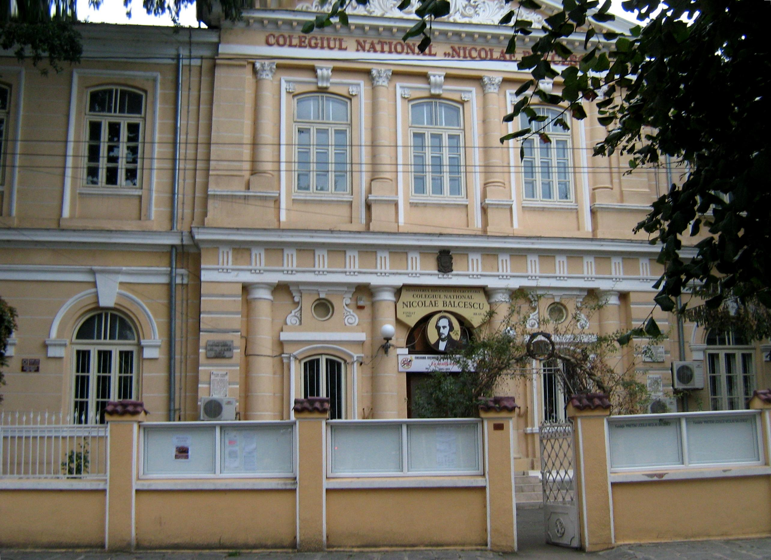 Colegiul Național „Nicolae Bălcescu”